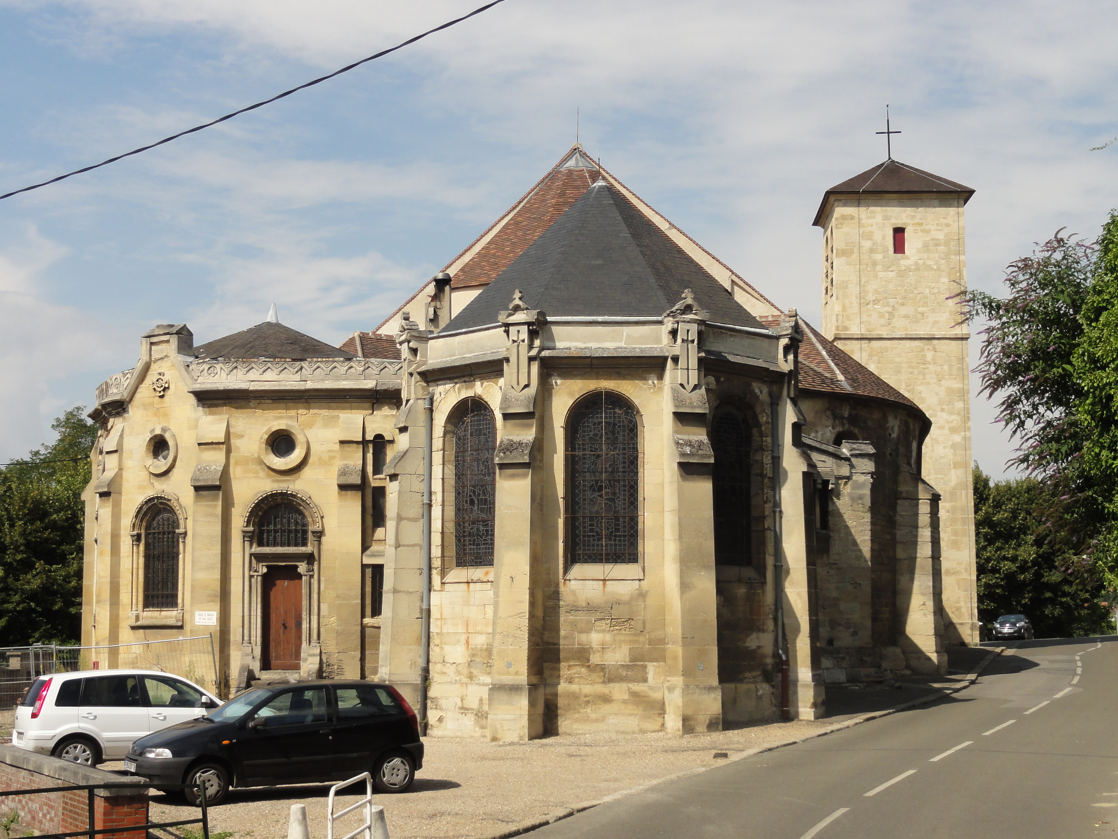 Église Saint-Nicolas de Meulan-en-Yvelines (voir titre).